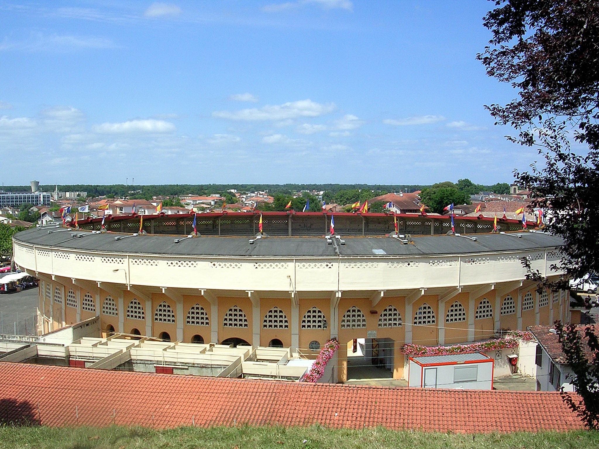 Arènes du Plumaçon à Mont-de-Marsan (Landes, France). Vue depuis les abords de la gare SNCF.